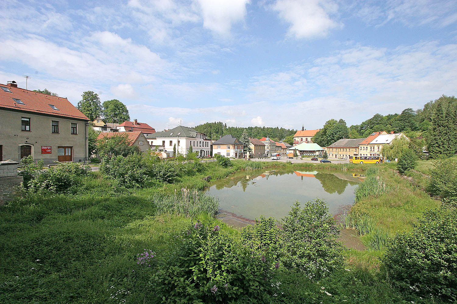 pohled od zámku (z mostu k zámku) na obec Nové Hrady v okrese Ústí nad Orlicí (dříve Chrudim)